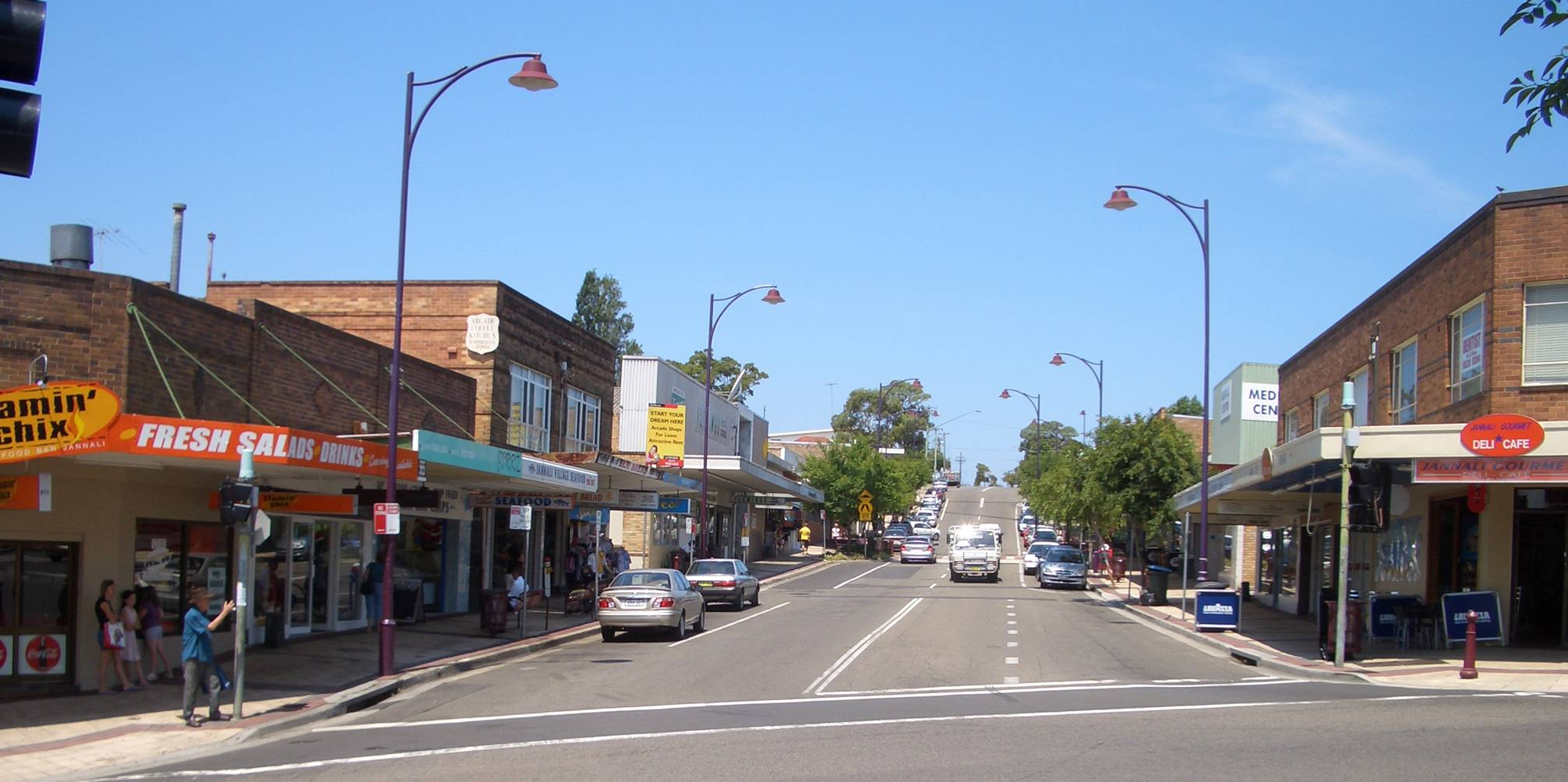 Jannali